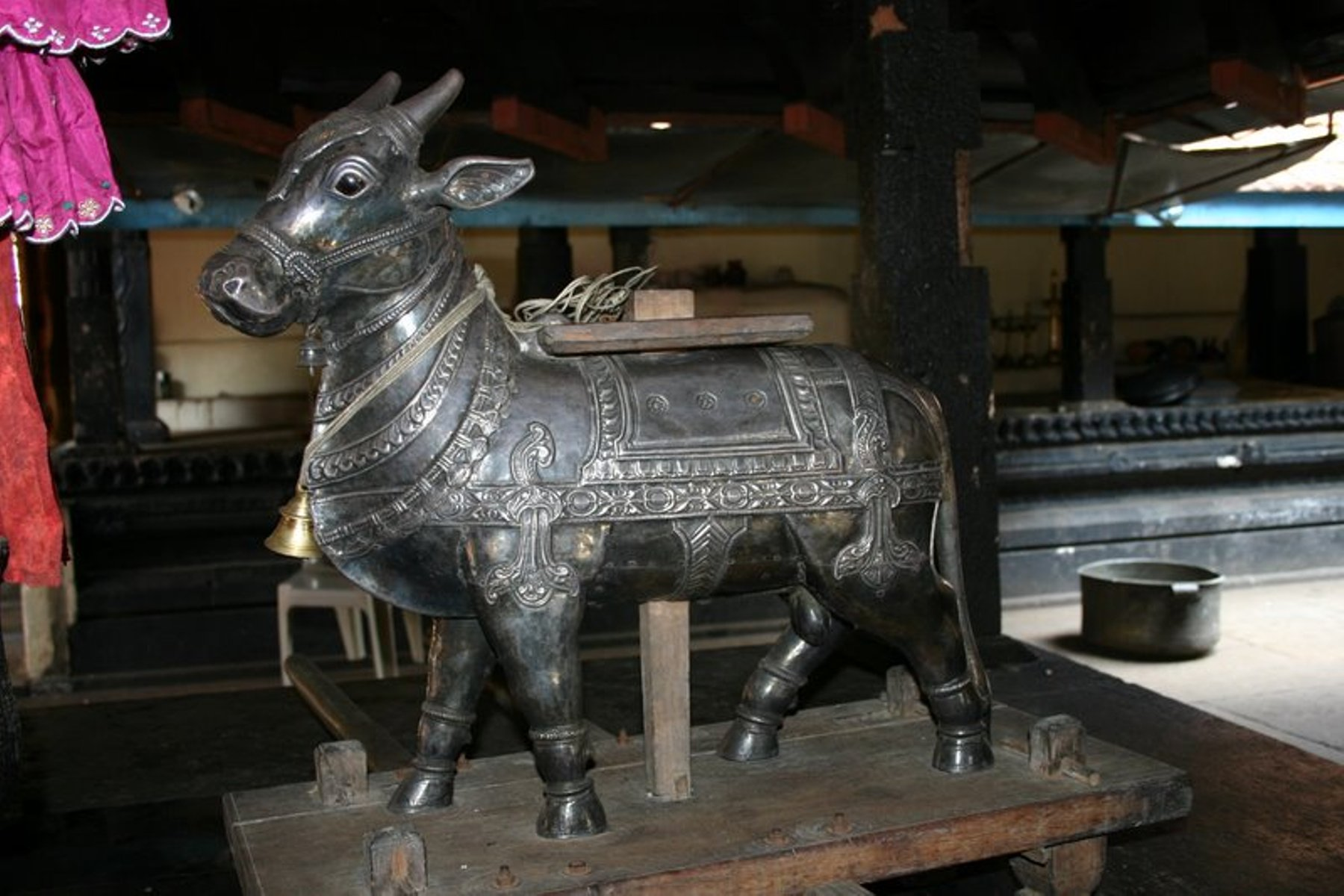 ഋഷഭവാഹനം-വാഴപ്പള്ളി